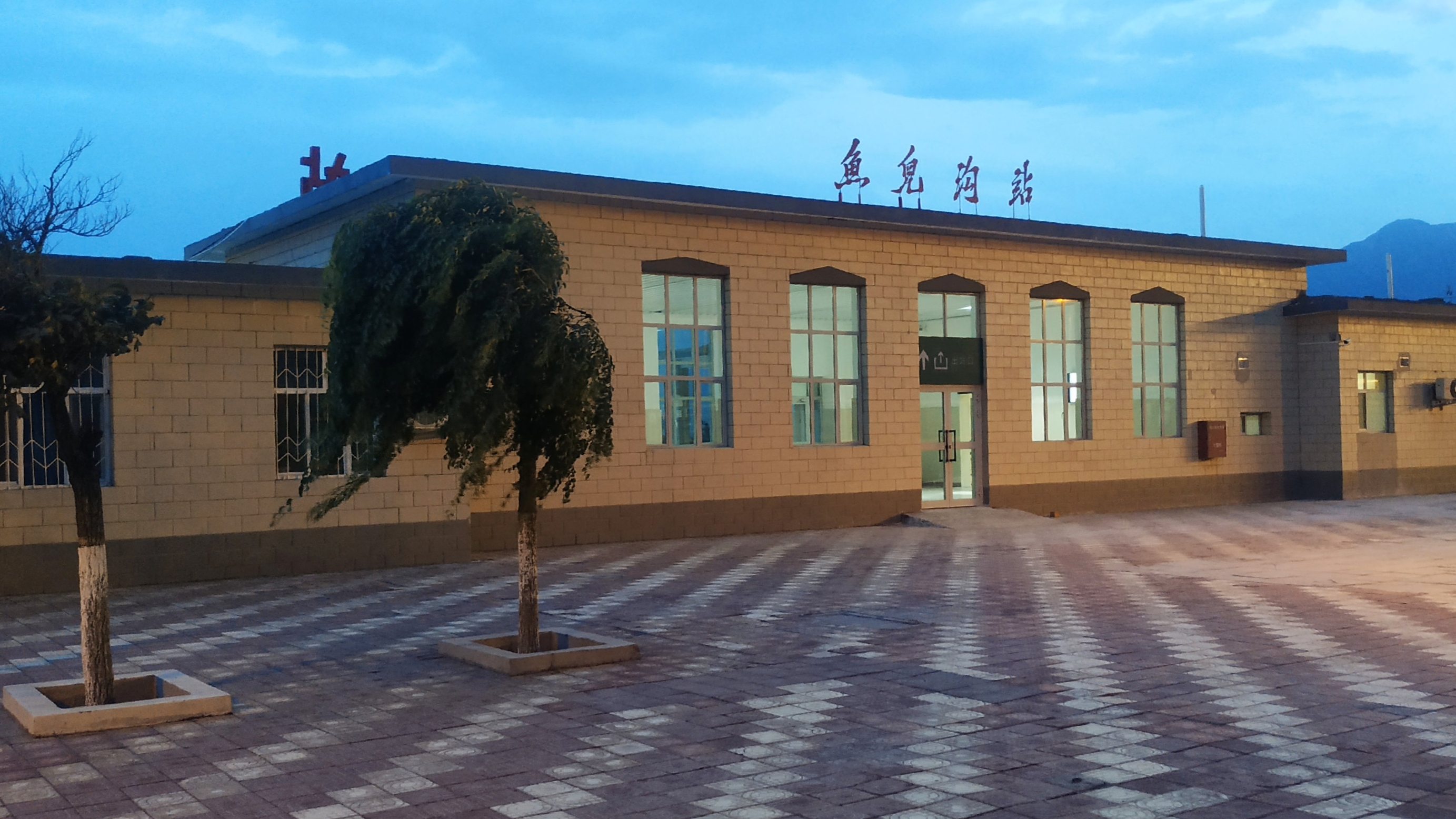 中文（中国大陆）: 鱼儿沟车站